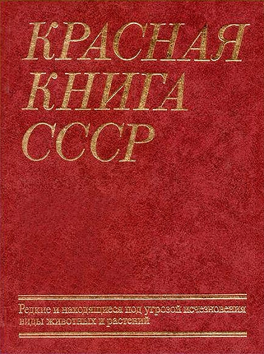 Первая Красная книга СССР, август 1978 г.